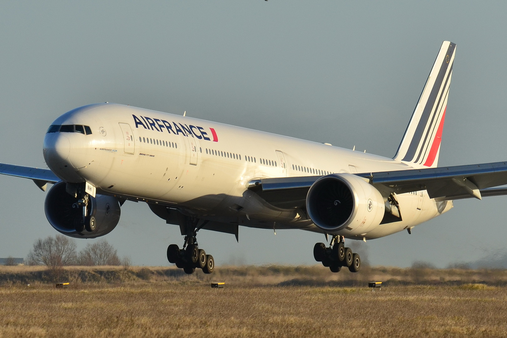 Photo prise à l'aéroport de Roissy-Charles de Gaulle (LFPG) en France. Picture take at Roissy-Charles de Gaulle Airport (LFPG) in France.